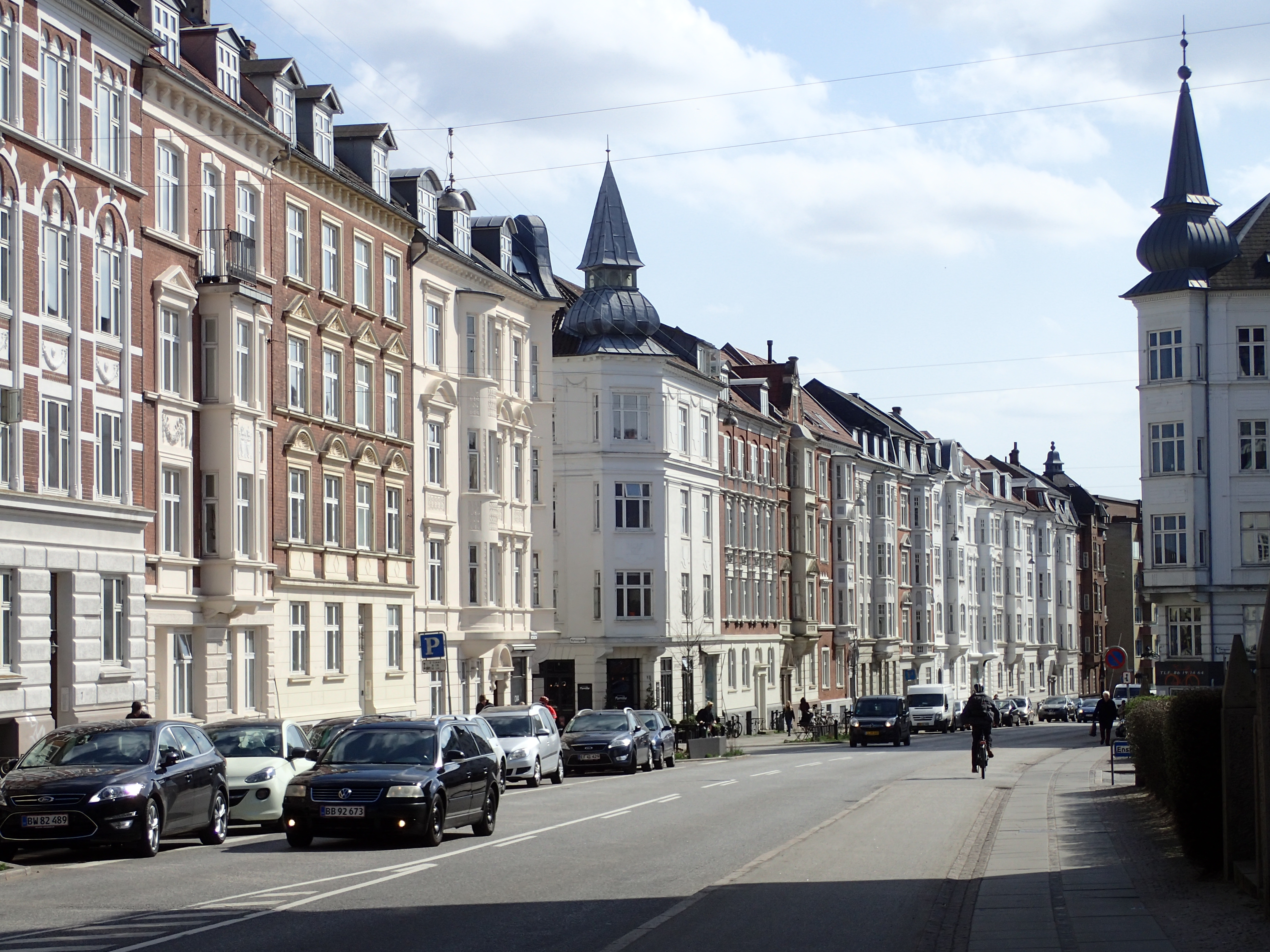 Hans Broges Gade